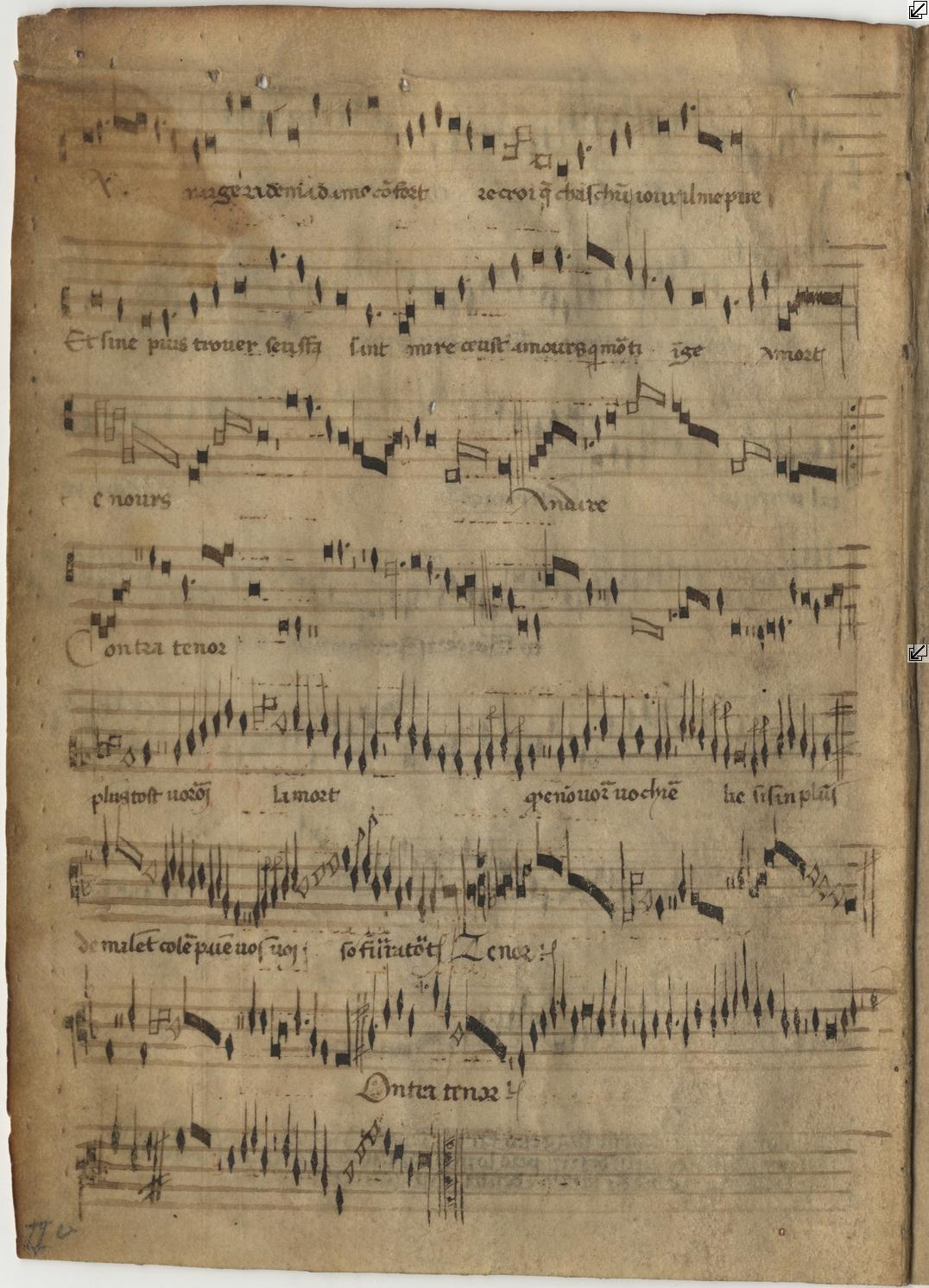 Pistoia, Archivium Capituli Pistoriensis B.3.5